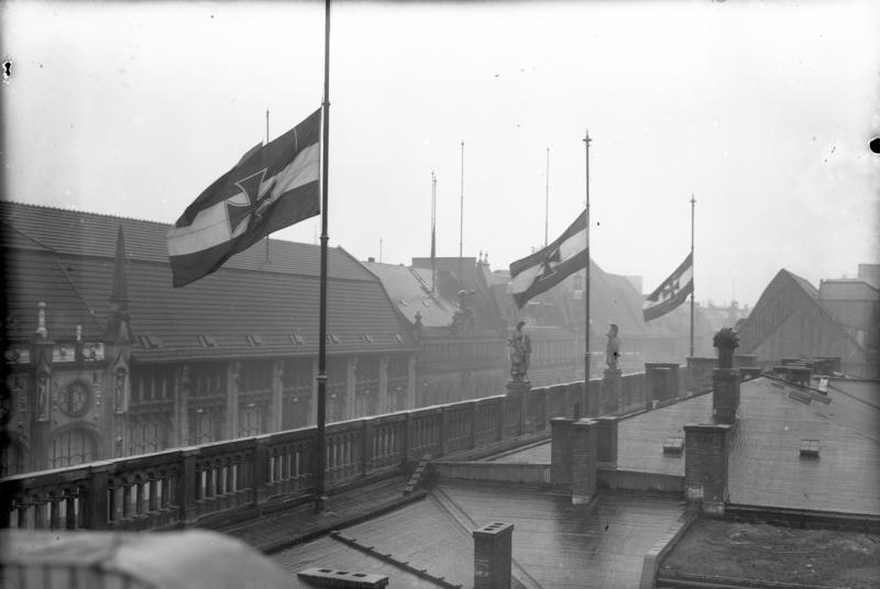 Zum grossen Volkstrauertag am 1. März ! Die auf Halbmast wehenden Fahnen auf dem ehemaligen Kriegsministerium.